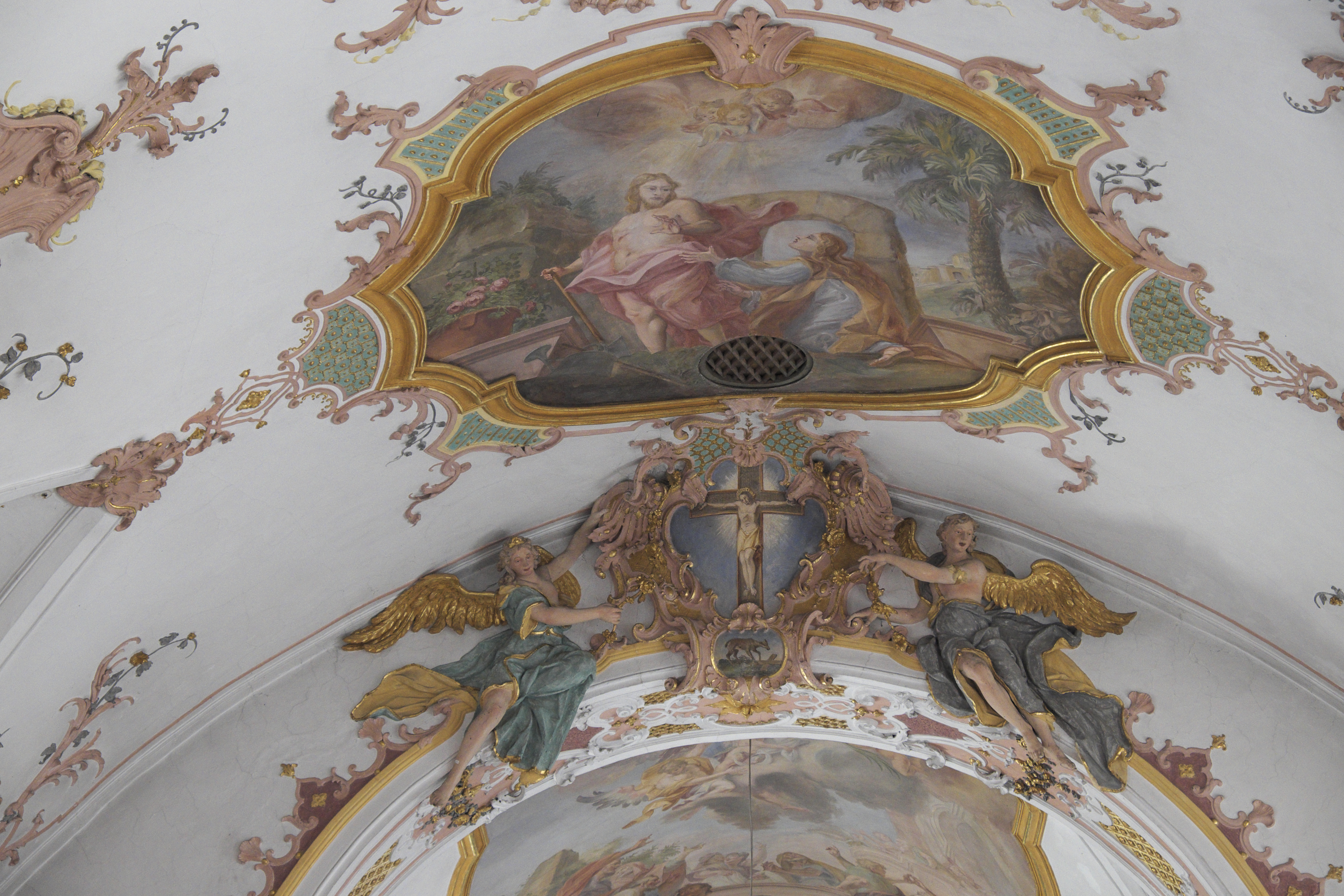 Katholische Pfarrkirche Mariä Himmelfahrt in Walleshausen, einem Ortsteil von Geltendorf im Landkreis Landsberg am Lech (Bayern/Deutschland), Deckenfresko im Langhaus über dem Chorbogen von Johann Georg Wolcker; Darstellung: Noli me tangere; in Stuckkartusche Wappen des Klosters Polling (Tassilo-Kreuz und Hirschkuh)